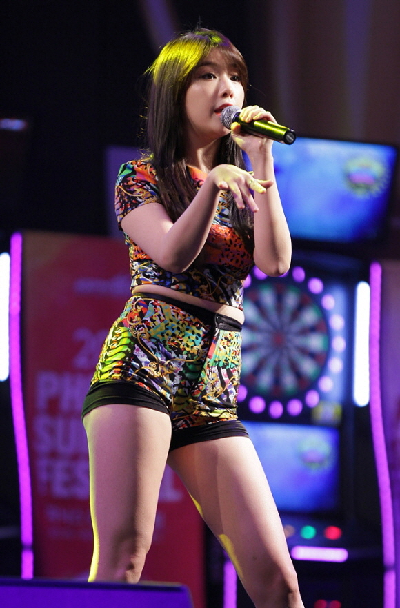 걸스데이(Girl's Day) 2015 피닉스 섬머 페스티벌 일산 킨텍스